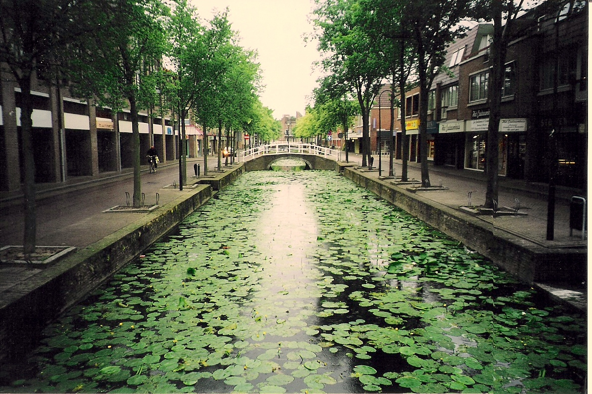 DELFT - Oude Delft (Canal Vell)